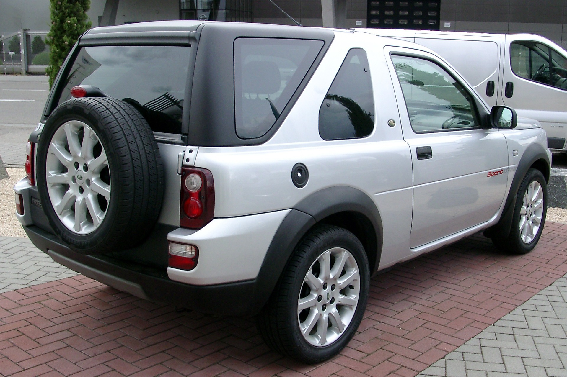 Land Rover Freelander I Facelift